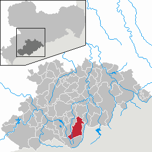 Sehmatal im Erzgebirgskreis, Sachsen